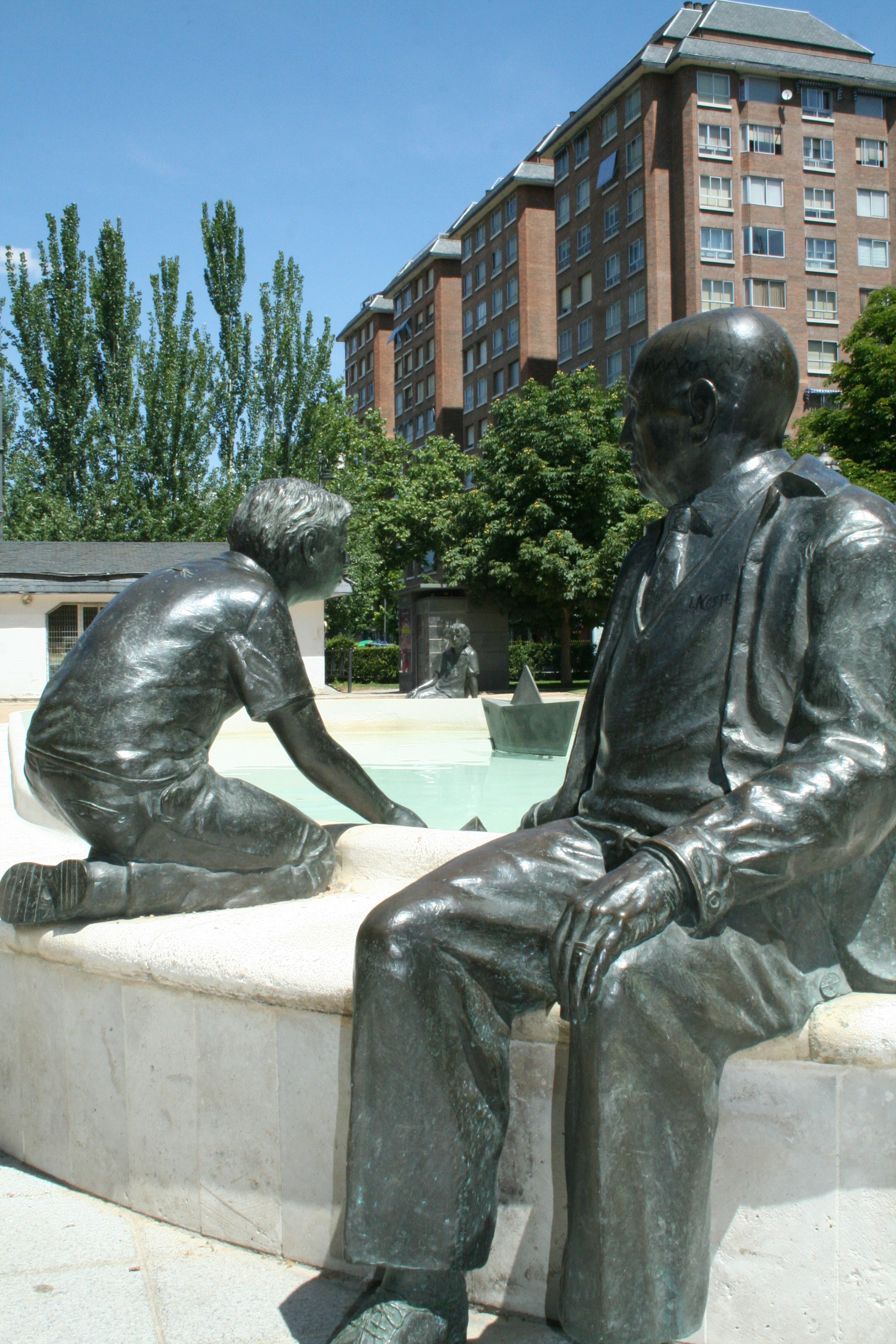 A remojo